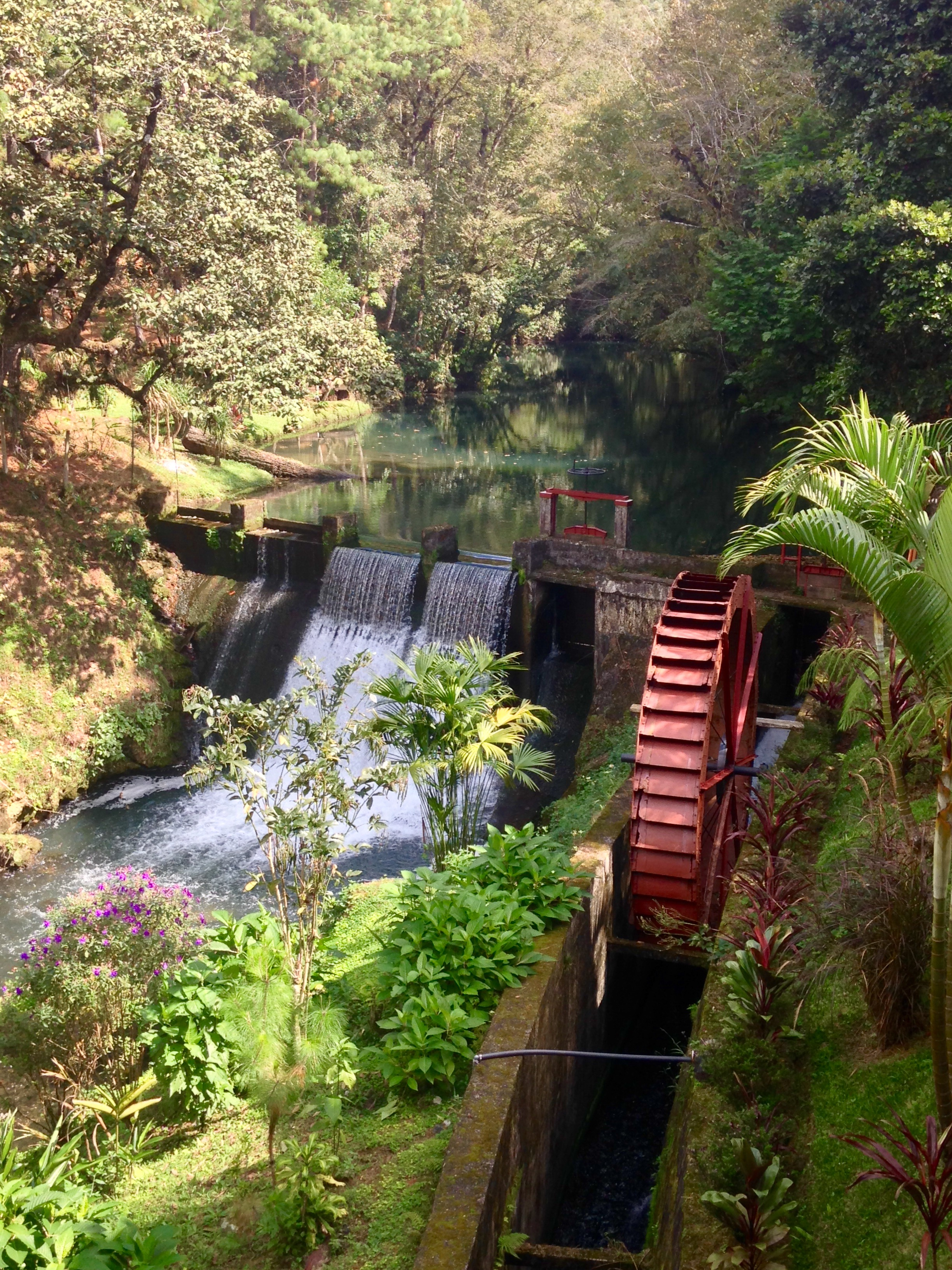 Presa y trapiche en finca Aurora, antiguo beneficio de café. Santa Cruz Verapaz, diciembre de 2015.